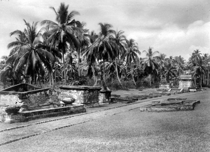 Repronegatief. Europees kerkhof bij Fort Speelwijk, Bantam